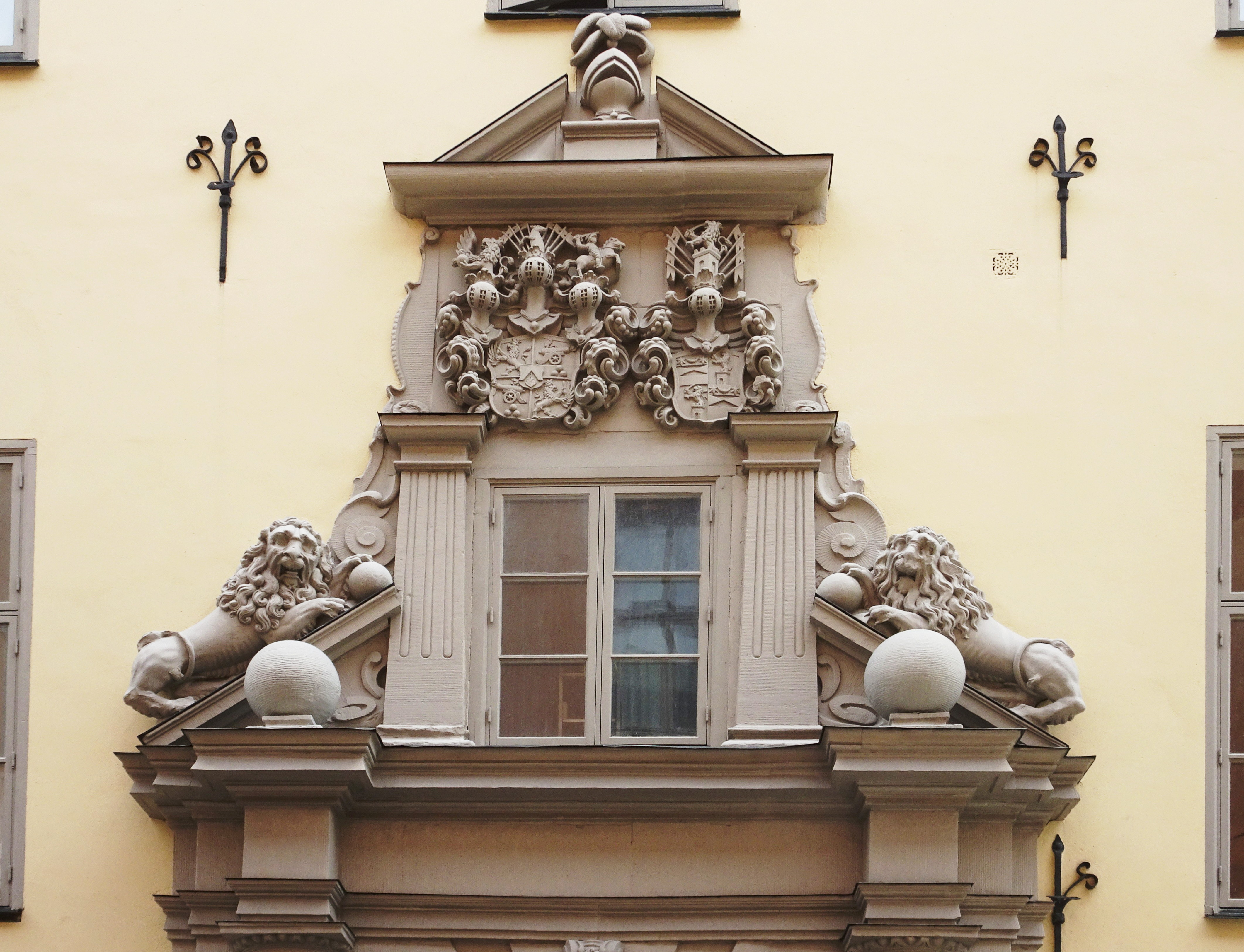 Arvfurstens palats, portalöverstycke med Torstensons och hans hustru Beata De la Gardies vapen